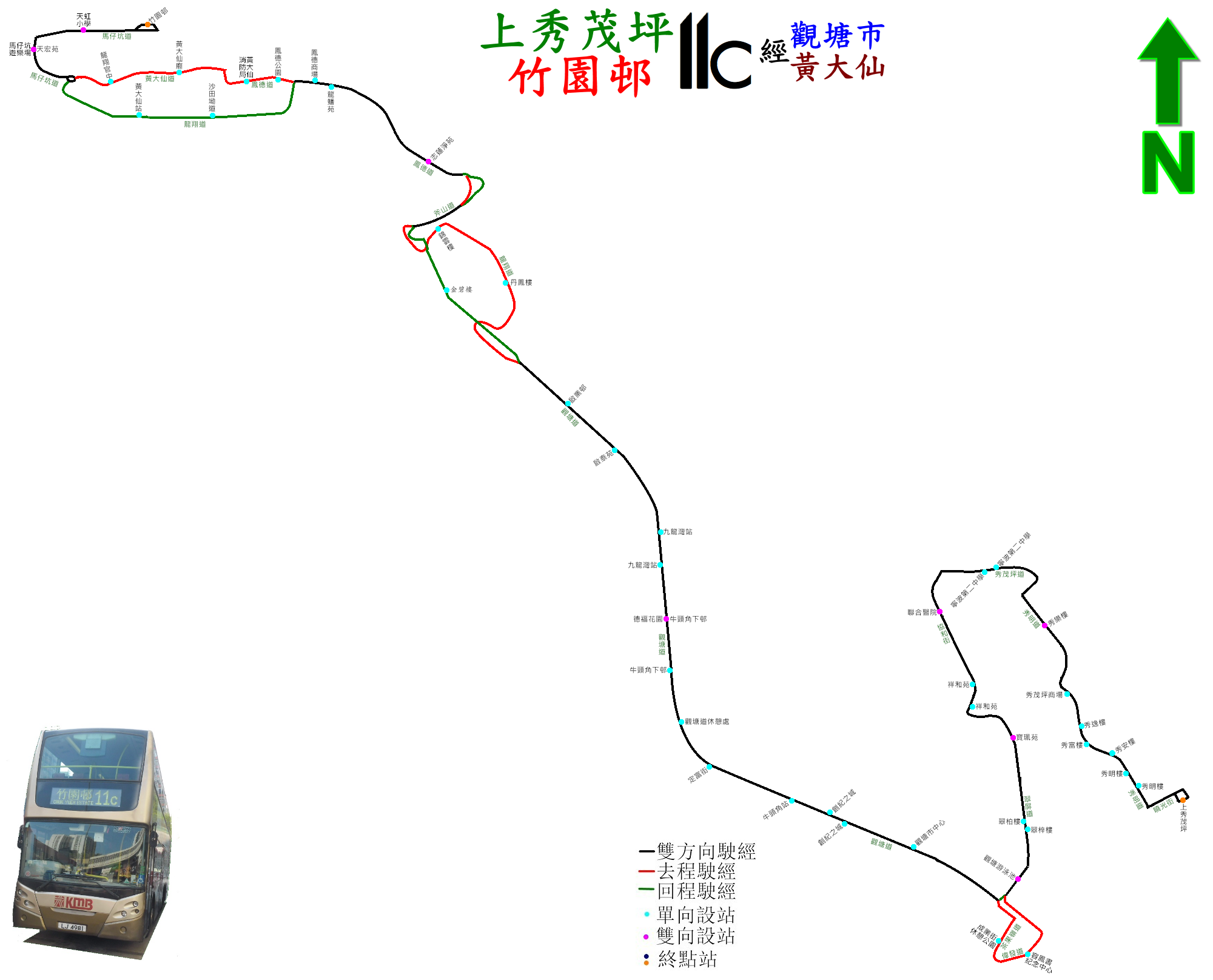 中文（香港）: 九巴11C線的走線圖